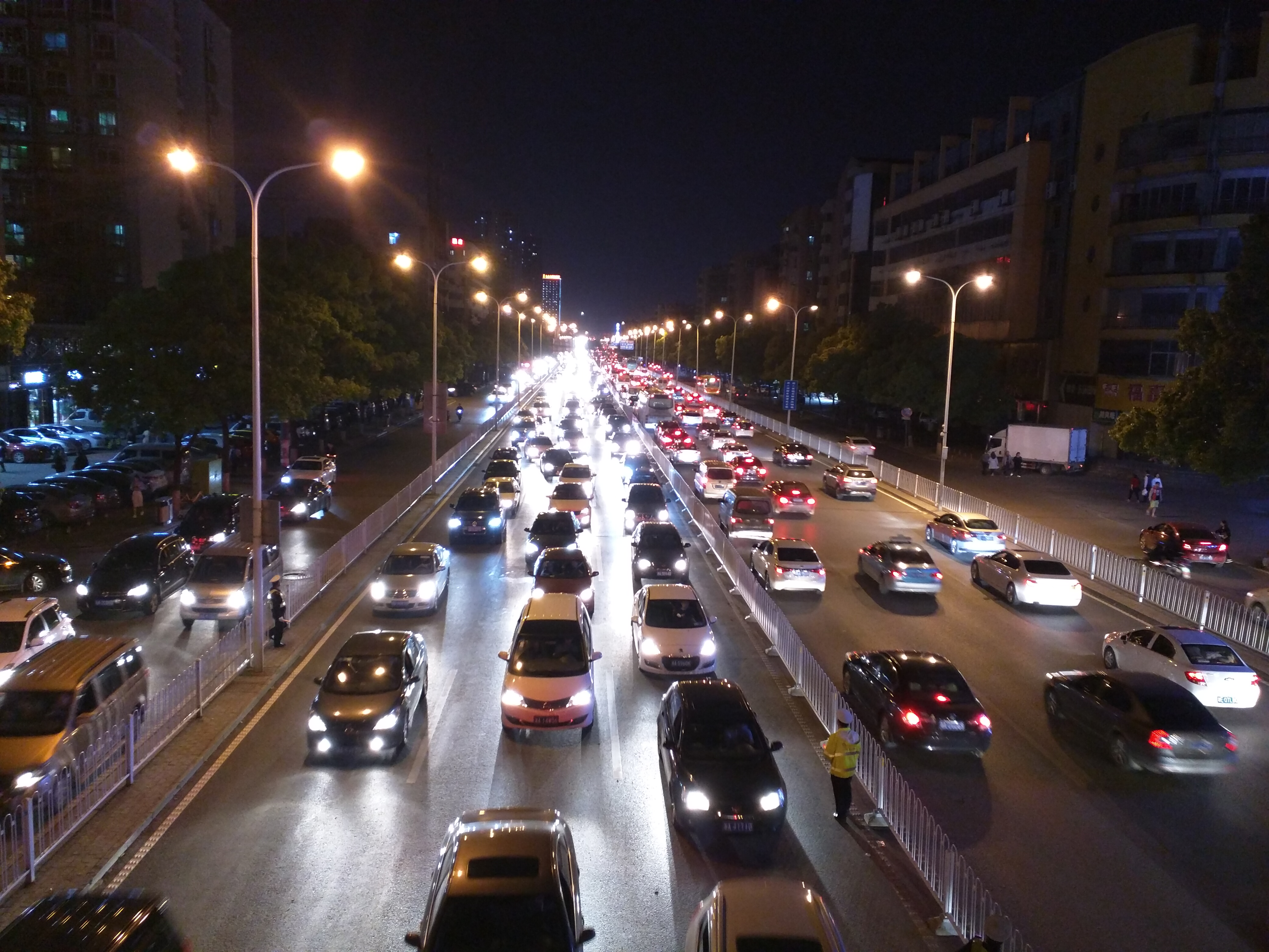 中文（中国大陆）: 长沙市东二环一处南往北车道，拍摄于荷花路口公交站上方的天桥（锦泰广场地铁站2号出口附近），照片远处为南方。图中交警似乎在等待查处“电动车摩的”